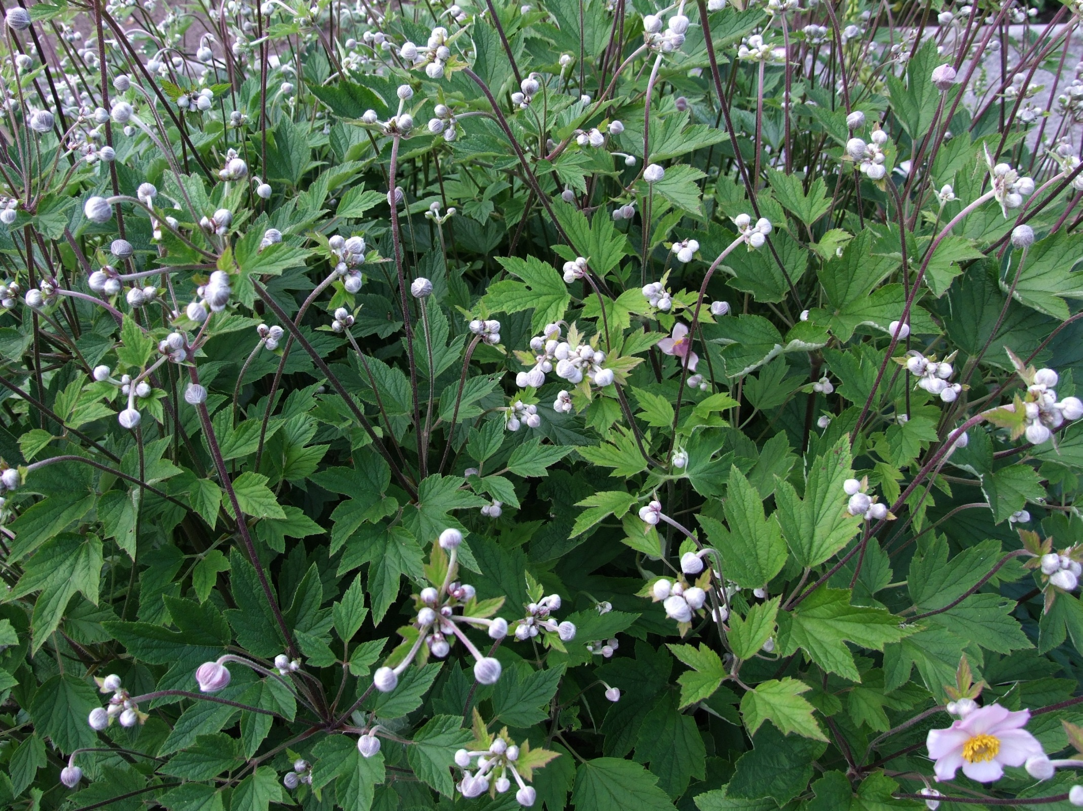 Anemone japonica (pl. zawilec chiński)